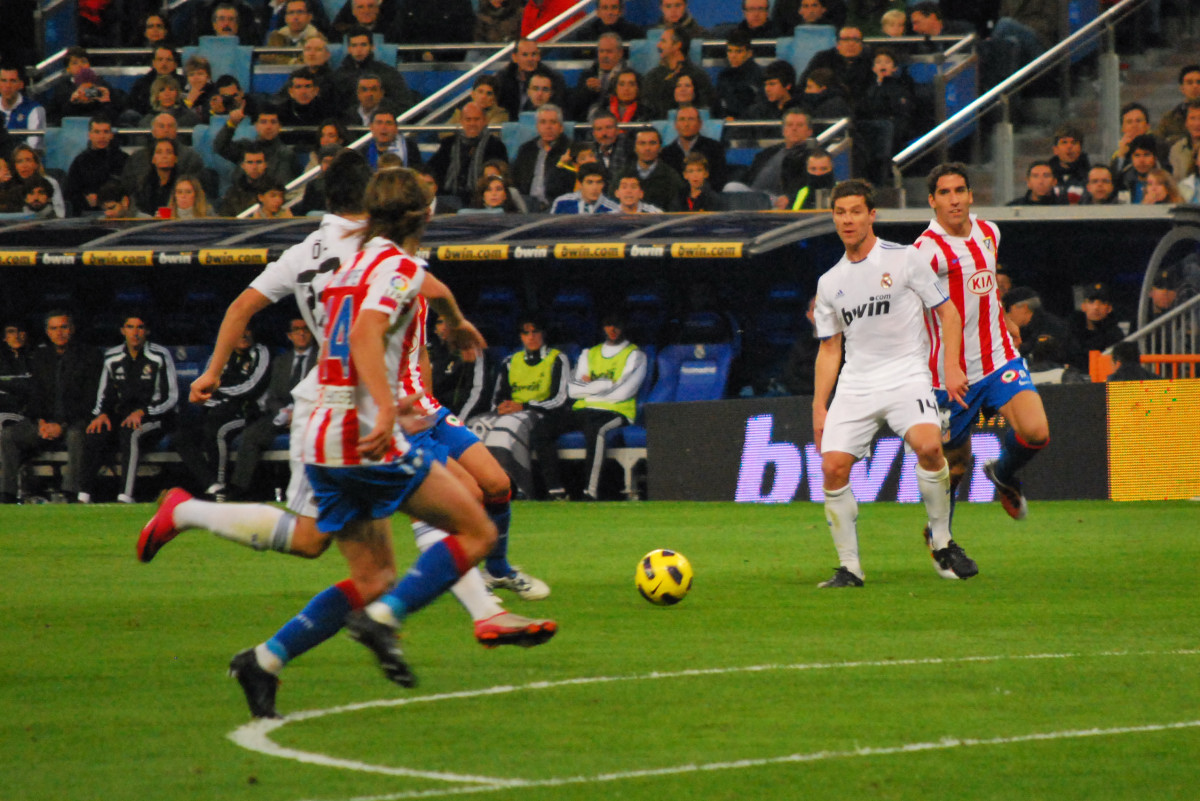 La Liga: Real Madrid 2 - Atletico 0 7 de Noviembre 2010